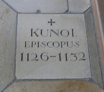 Kuno I